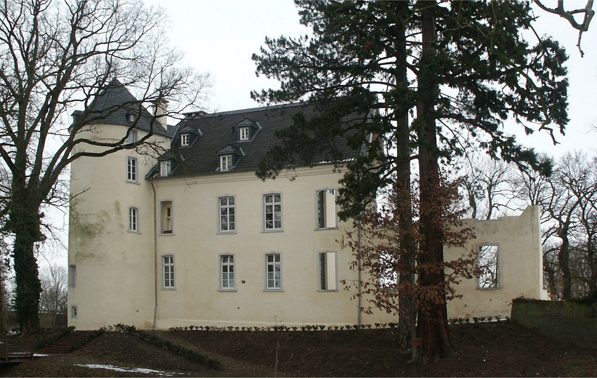 Kalkar-Appeldorn, Burg Boetzelaer mit Mammutbaum, Kalkar ND 06. Der Baum hat als direkte Nachbarn eine fast gleich hohe Fichte und eine viel kleinere Stieleiche